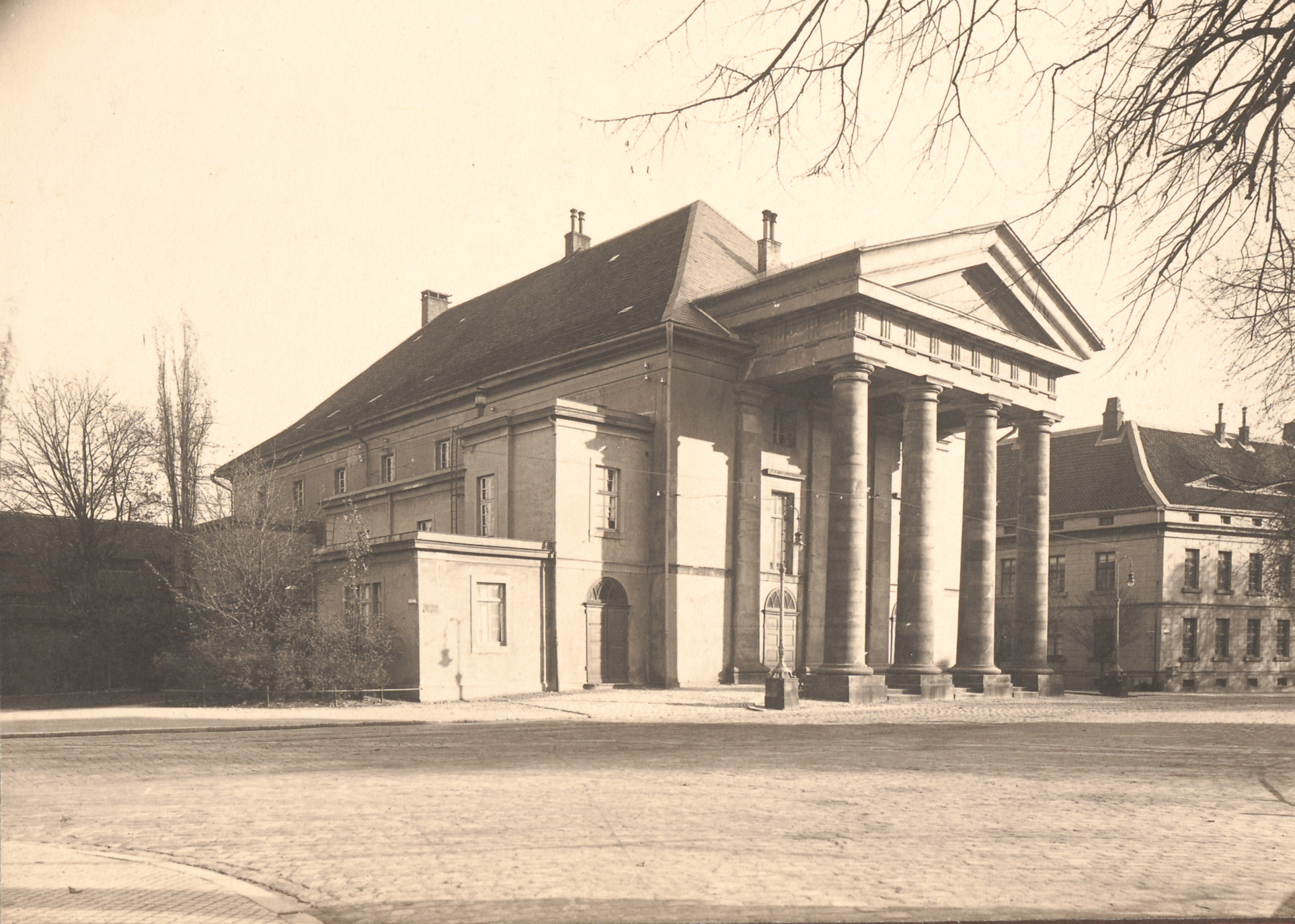 Hoftheater in Detmold um 1910